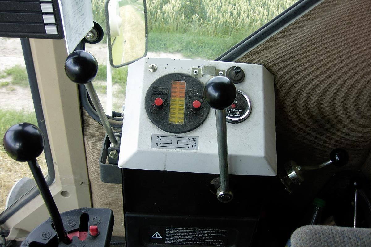 Gangschaltung und weitere Bedienelemente eines Claas Dominator 68 Baujahr 1996